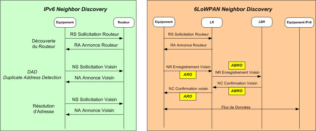 Evolution du diagramme de comparaison : Traduction des échanges en français